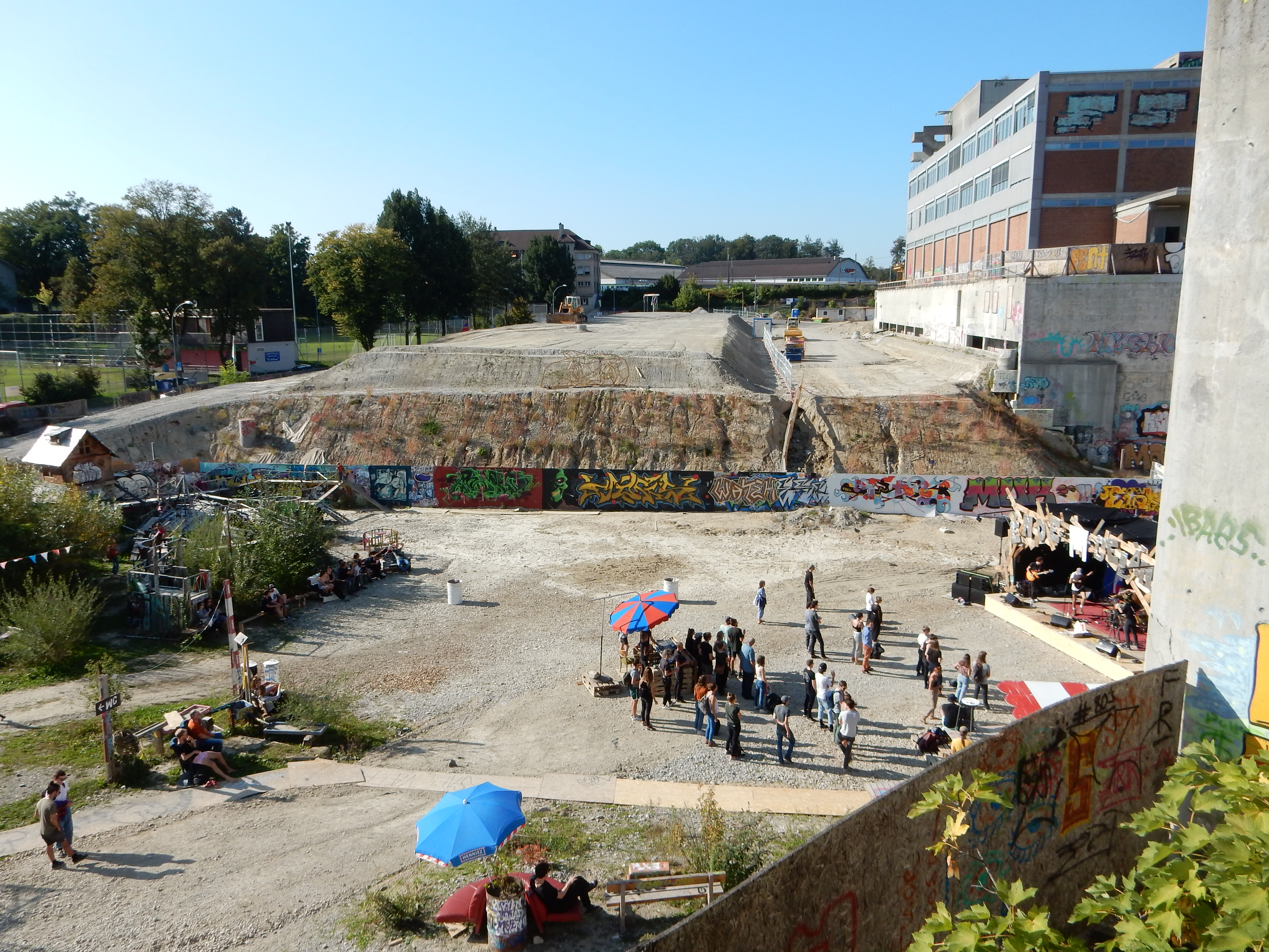 Bern (Schweiz): Holliger, Abschluss der Zwischennutzung